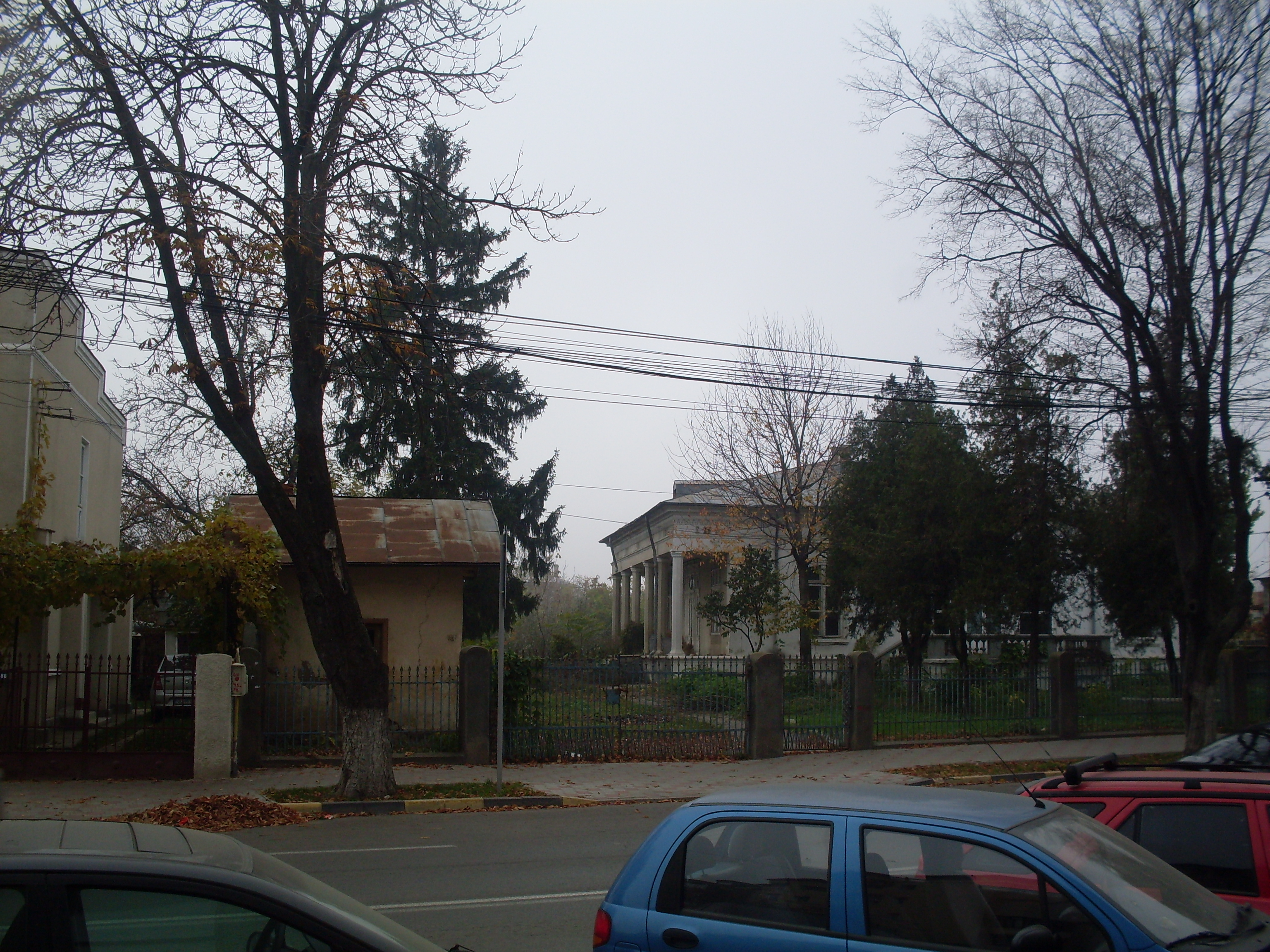 Casa Jan Koppethki